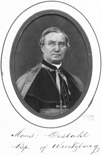 Georg Anton von Stahl, Bischof von Würzburg, 1870, I. Vaticanum